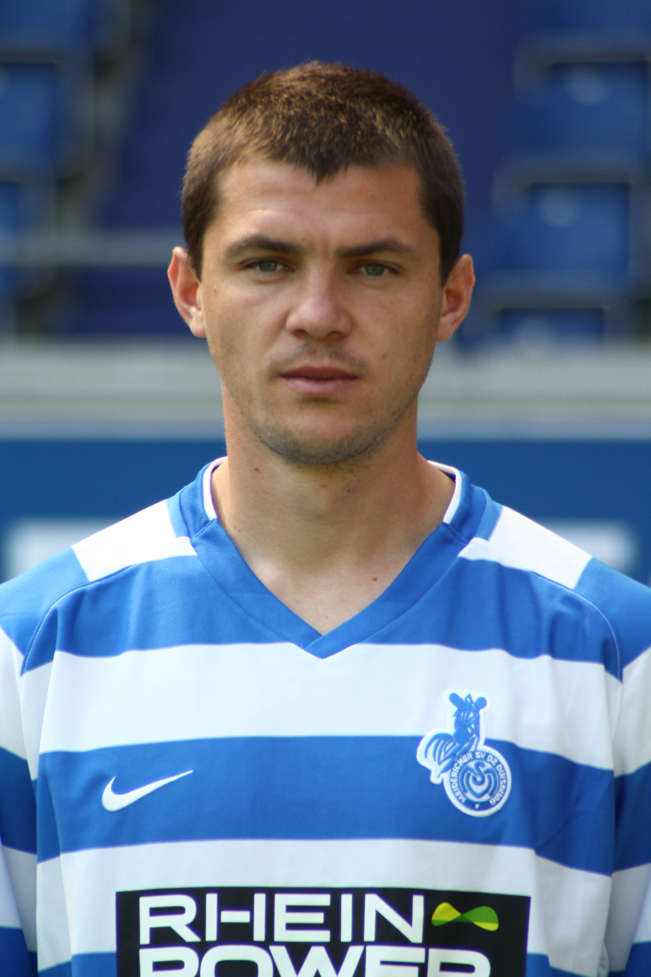 Valeri Domovchiyski, MSV Duisburg